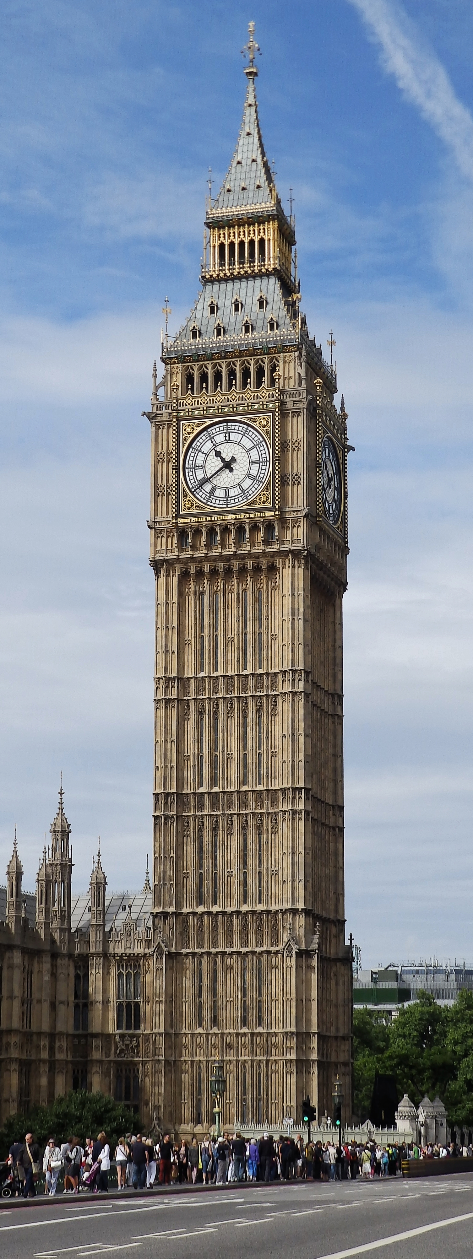 Der Big Ben im Jahr 2013